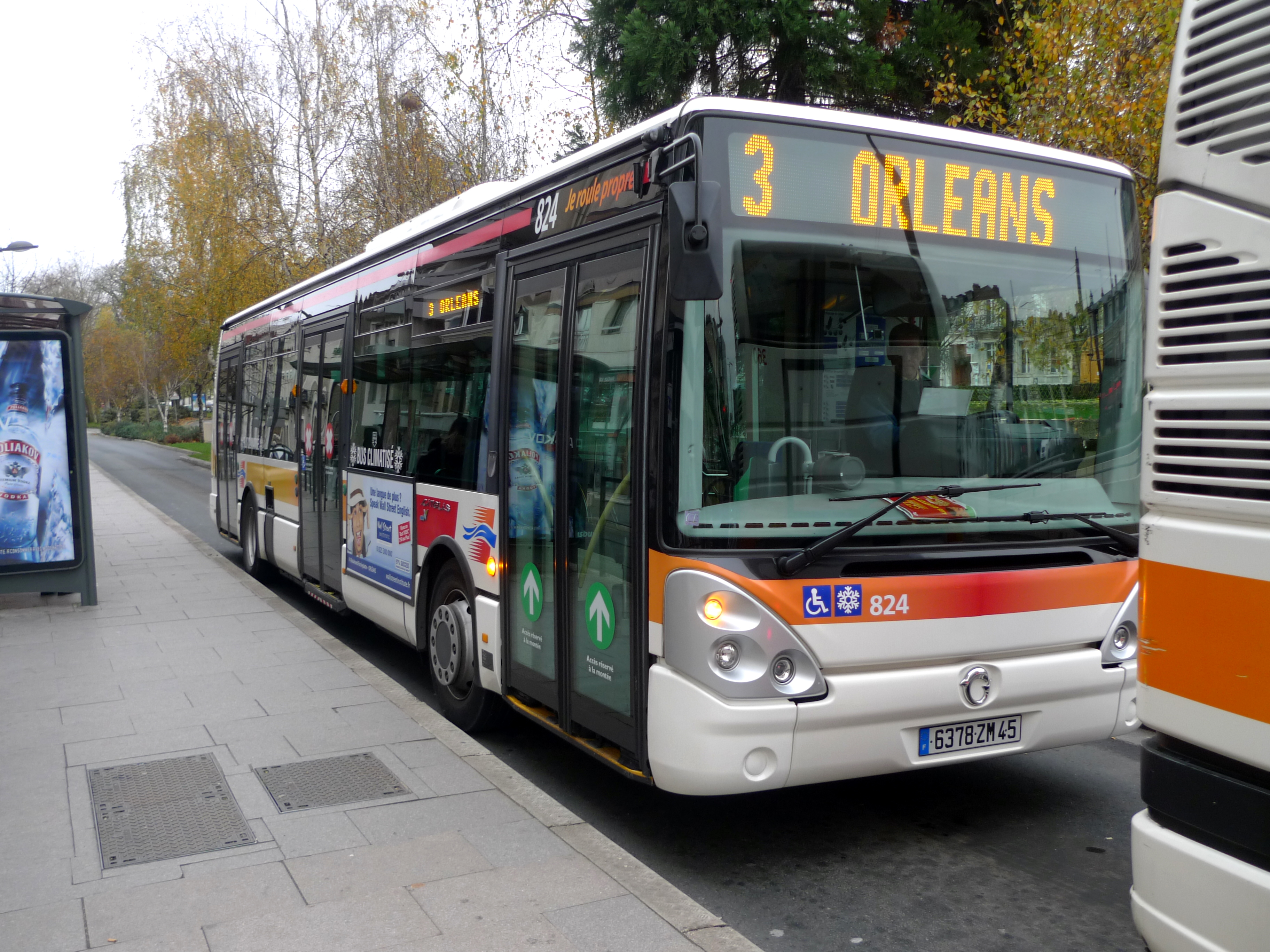 Bus du réseau TAO (ex-SEMTAO), en 2009.